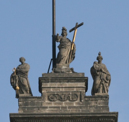 Nombre: Fe, esperanza y caridad. Fotografió: Carlos Martínez Blando (2005) Otra información: Esculturas en piedra por Manuel Tolsá colocadas por él en el remate de la fachada de la Catedral de México. Tomado con una cámara Canon Digital Rebel XT. Editado con Photostudio 5.5 (tamaño).